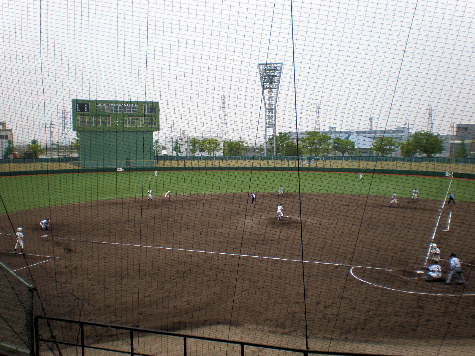 愛知県小牧市にある小牧市総合運動場野球場（小牧市民球場）